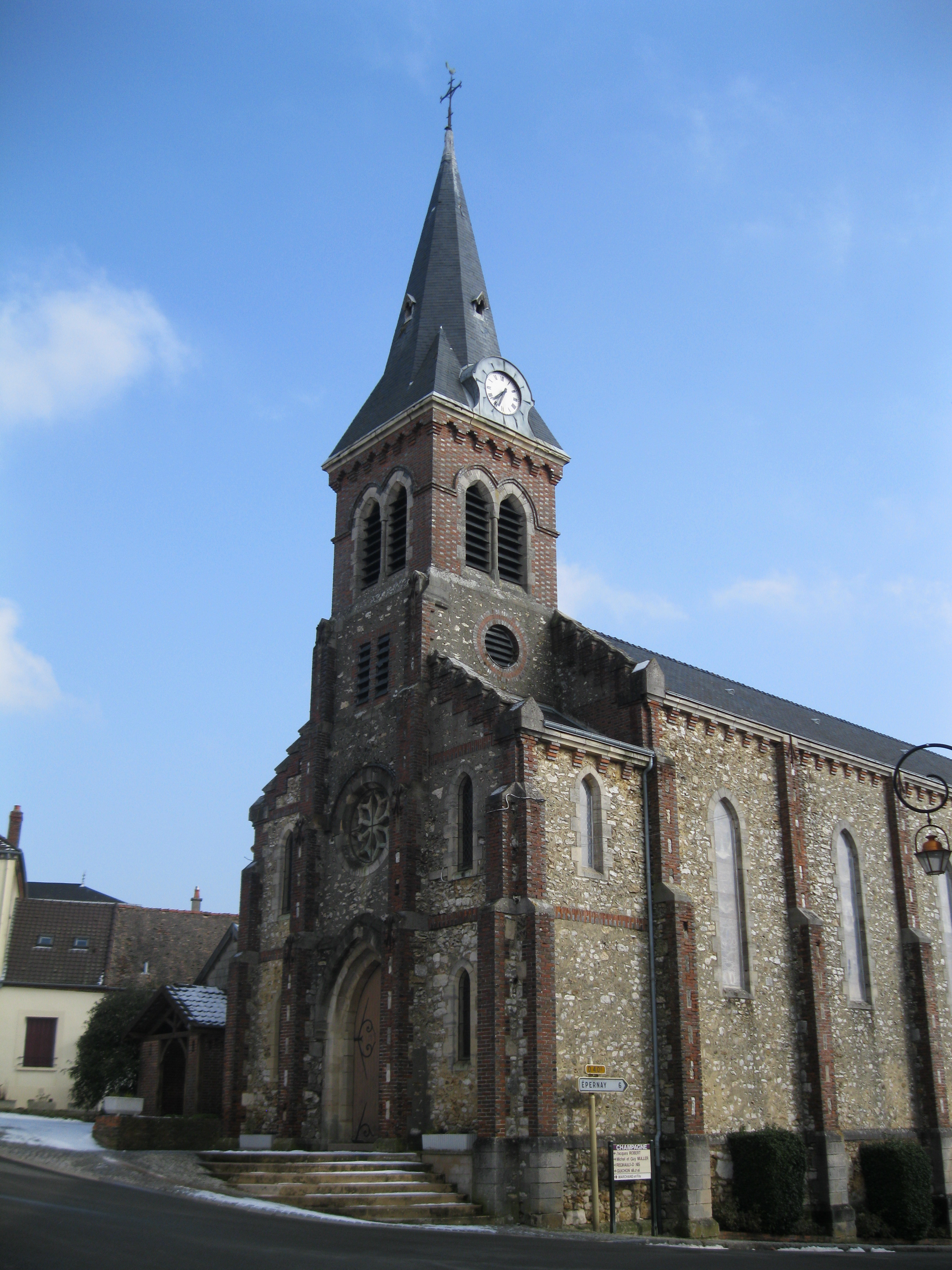 Façade ouest de l'église Saint-Nicolas de Monthelon, dans la Marne.